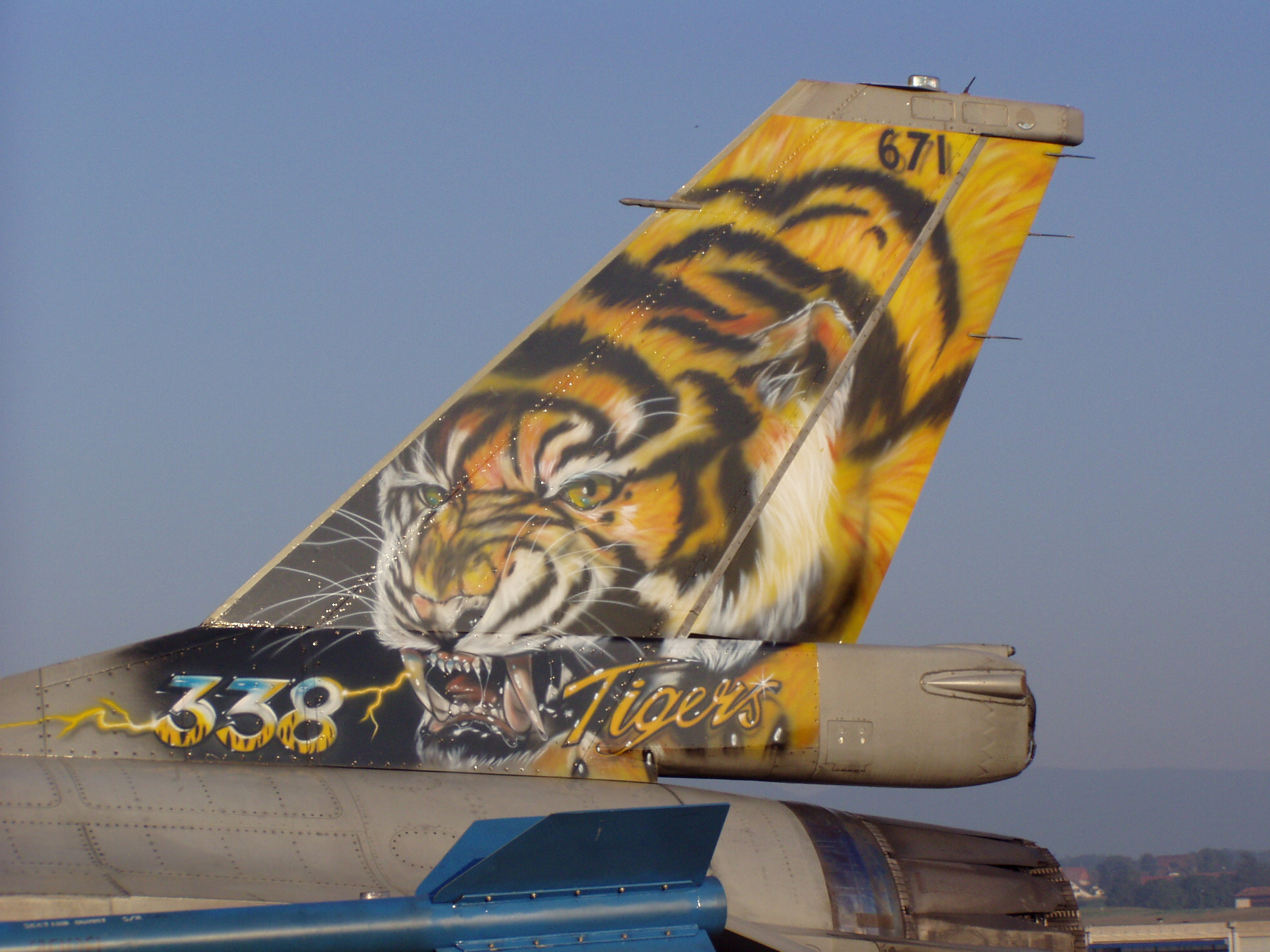 F-16 tiger Royal Norwegian Air Force - 338 Skvadron